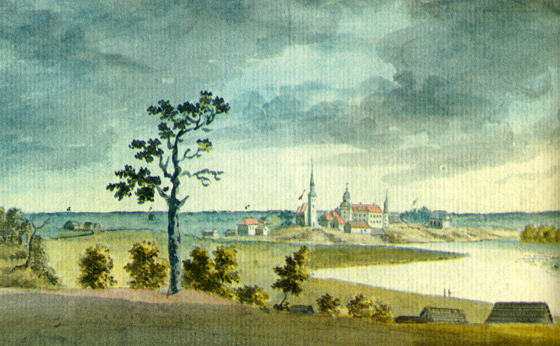 Vaade loodest Krustpilsile 1792 aastal. Paremal Väina jõgi.